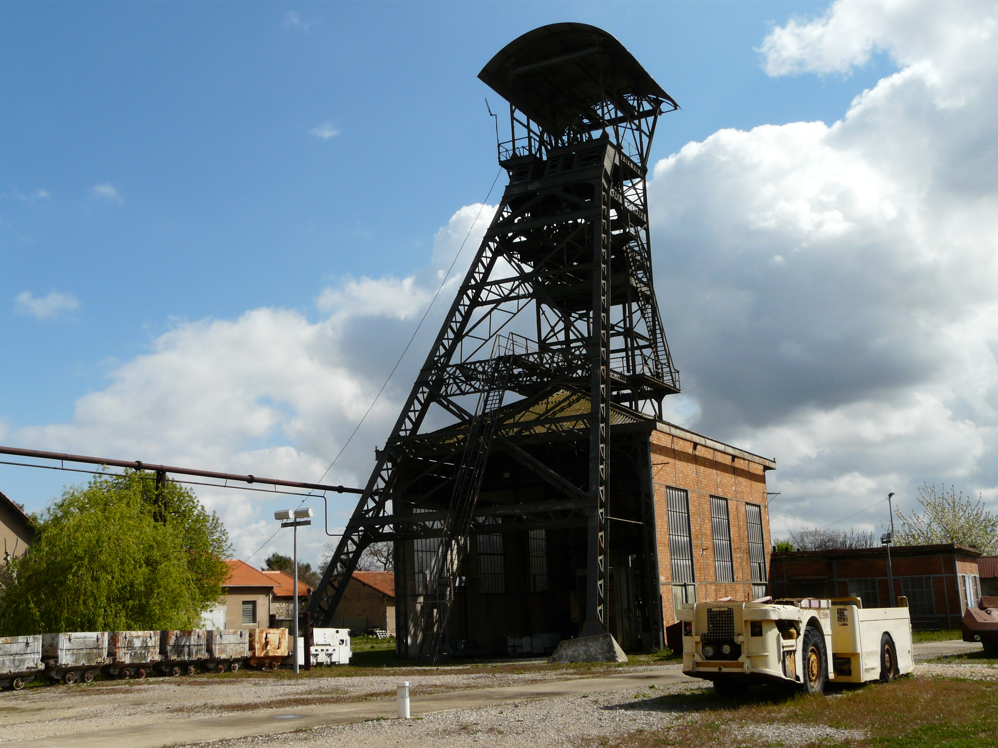 Chevalement du puits de mine Hély d'Oissel à Gréasque